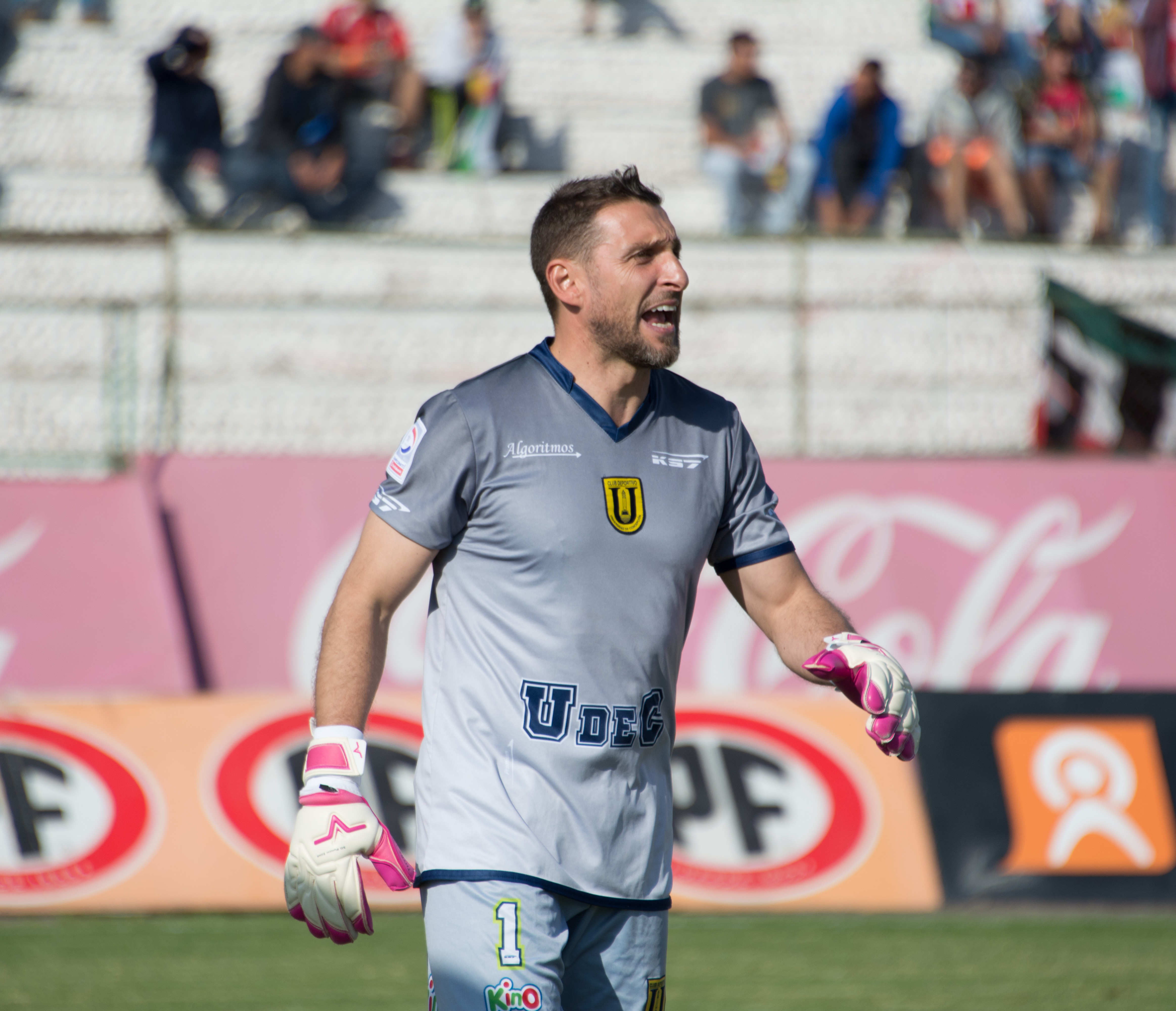 Cristián Muñoz, Palestino v Universidad de Concepción, Estadio Municipal de La Cisterna, La Cisterna, Santiago, Chile.